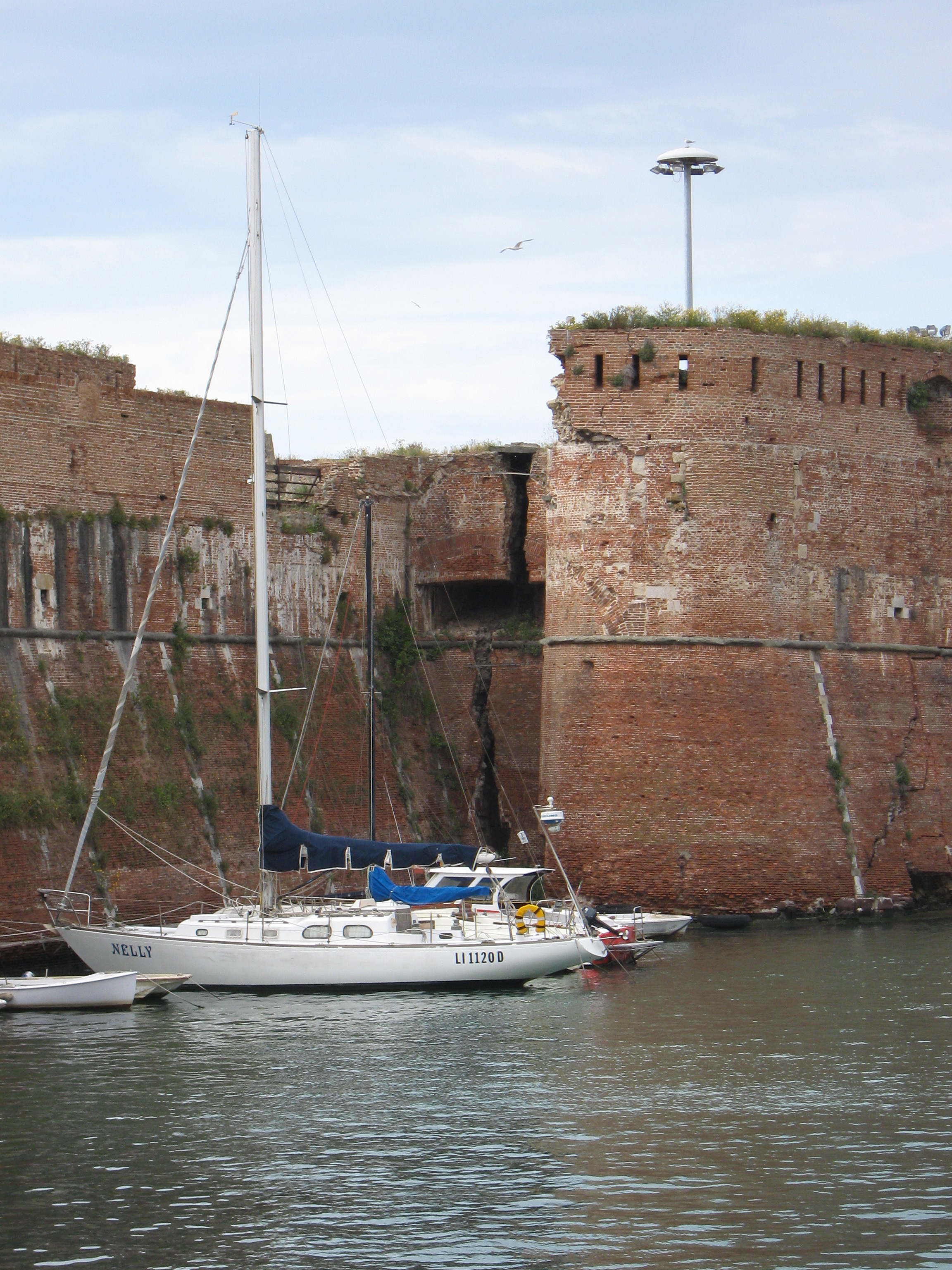 Livorno: particolare della grande lesione del bastione della Capitana nella Fortezza Vecchia, causata dall'esplosione della polveriera posta all'interno dello stesso bastione durante la seconda guerra mondiale.